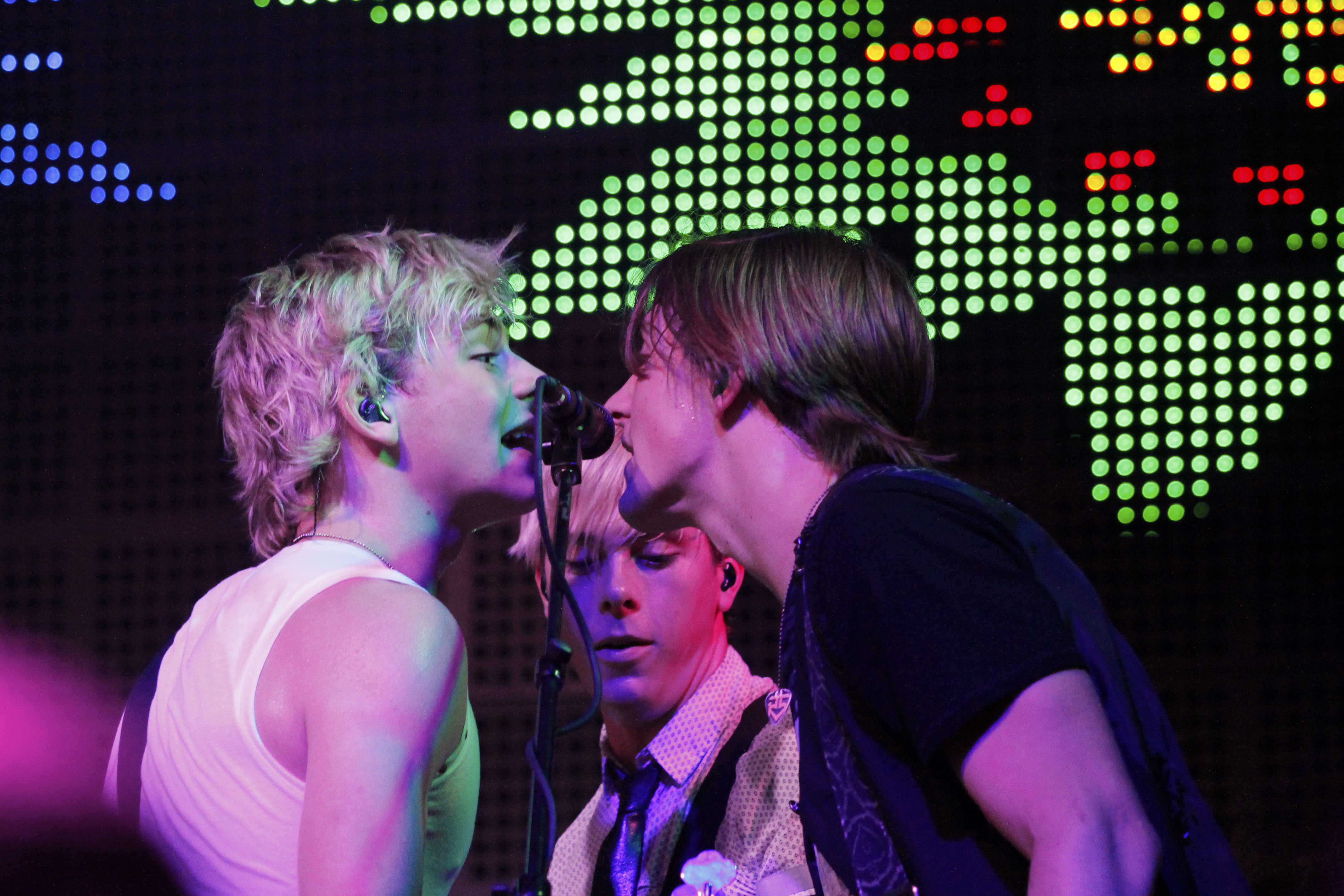 R5band